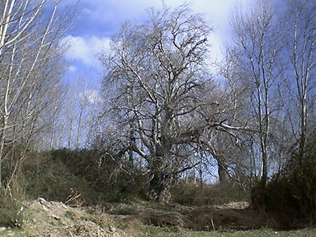 Aragonés: Árbol blanco de Bureta (Campo de Borcha, Aragón).